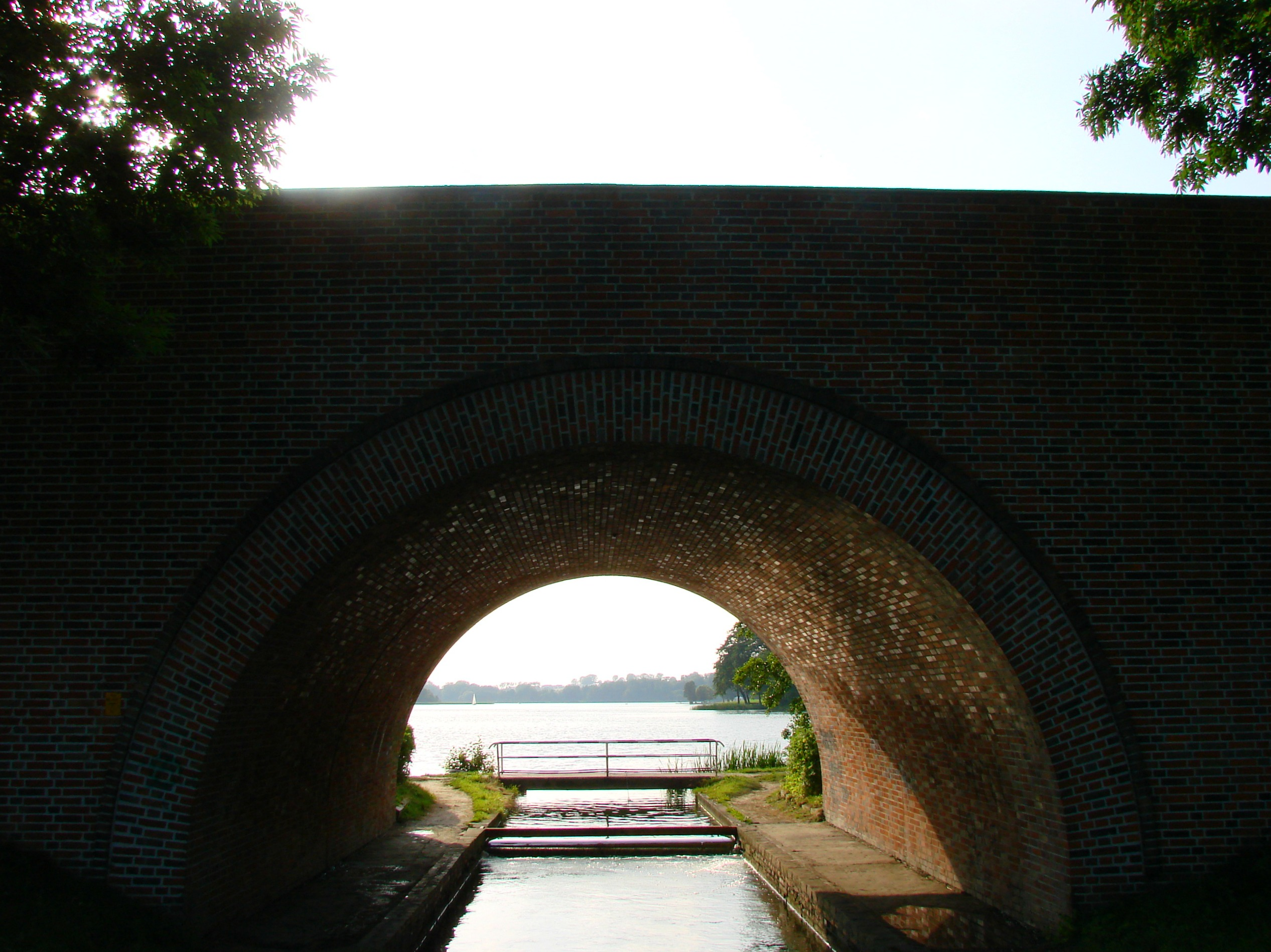 Most Drogowy nad rzeką Sępolną (Sępolenką), na Starym Mieście; część DK 25, ul. T. Kościuszki, u dołu część deptaku, w tle Jezioro Sępoleńskie. Obiect in Sępólno Krajeńskie, Poland.